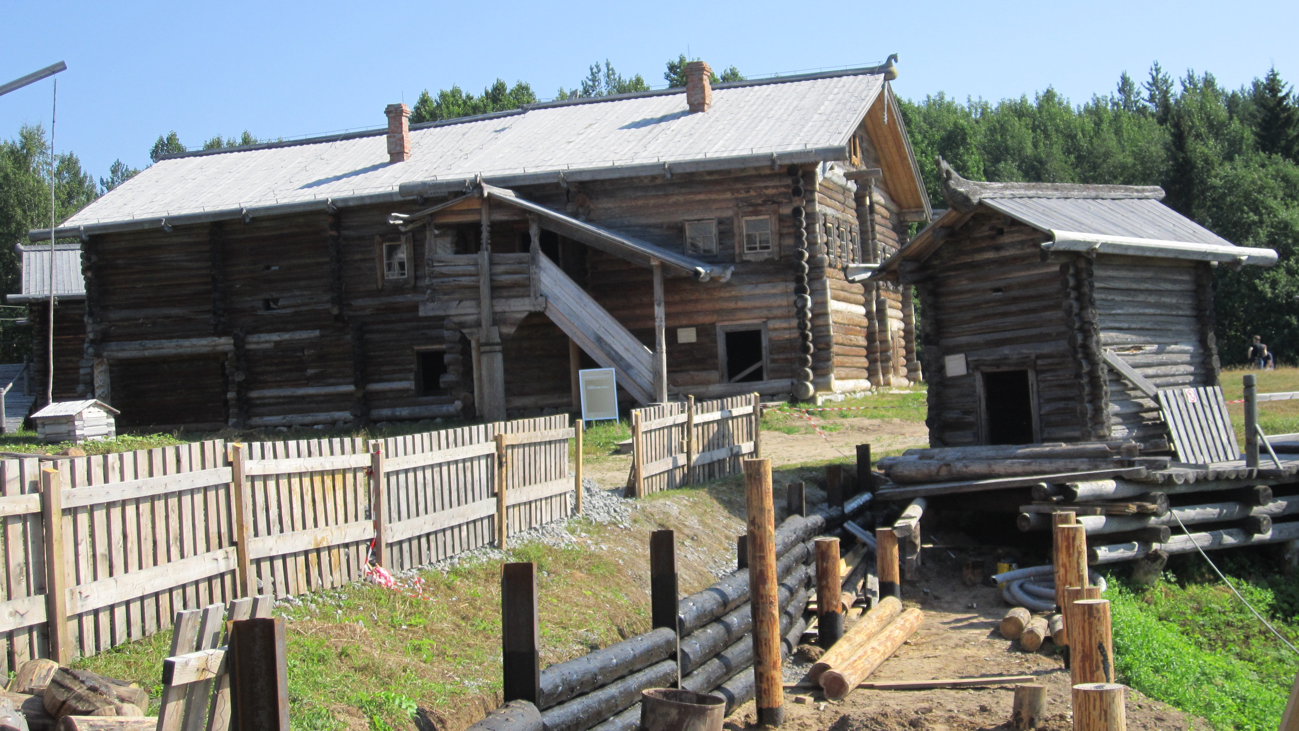 Мезенский сектор (Архангельская область, Новодвинск, деревня Малые Карелы)